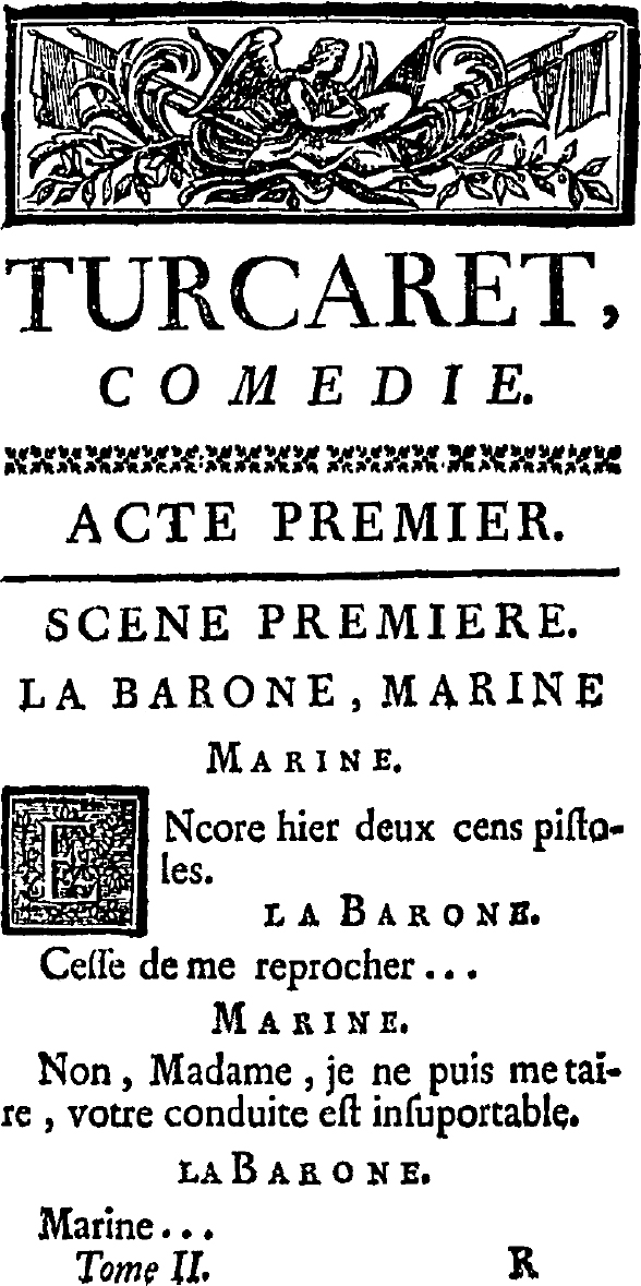 Frontispiece of Alain-René Lesage's Turcaret